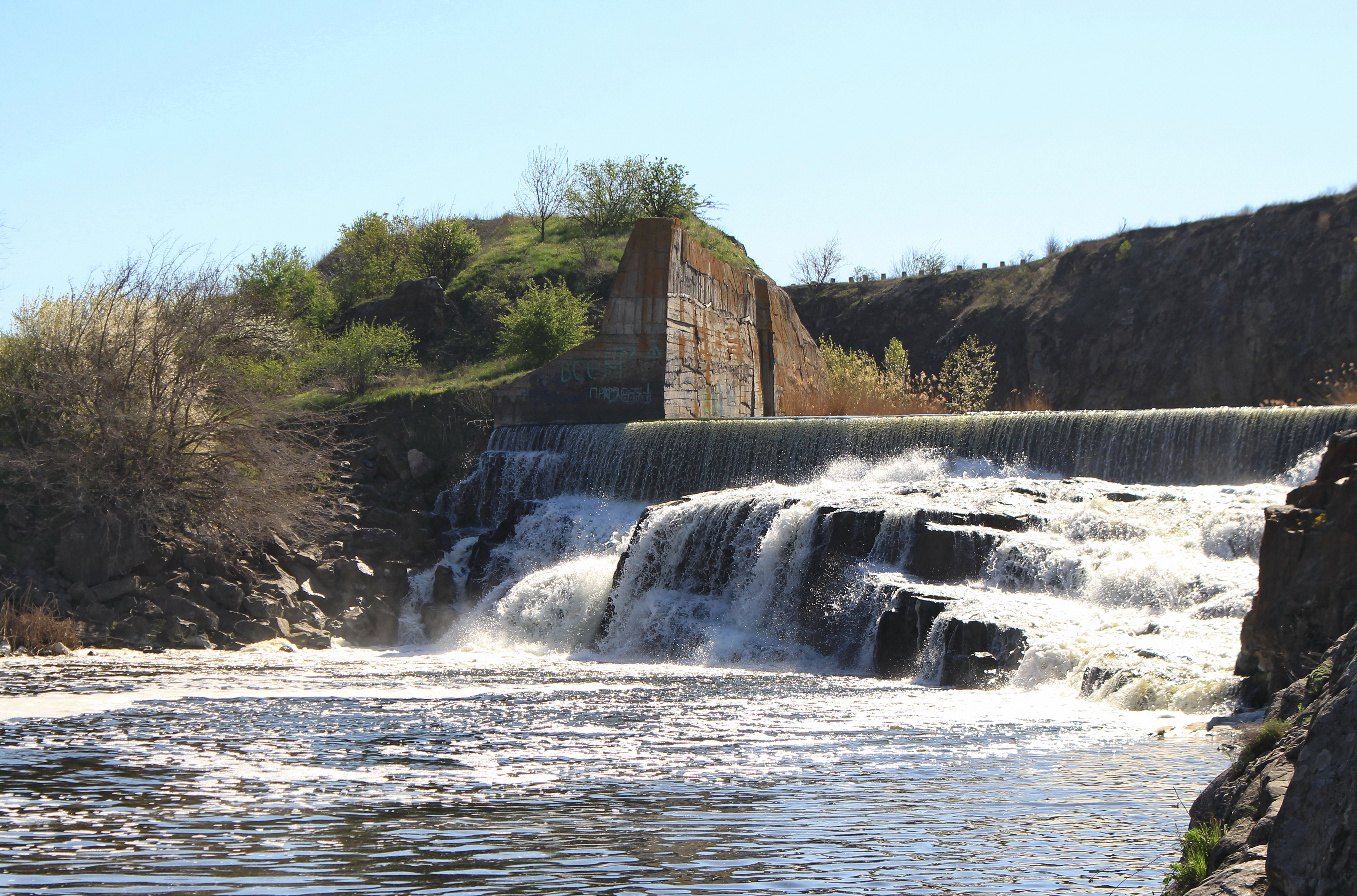 Приінгульський, Новобузький р-н